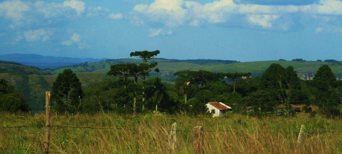 Proximidades da Unidade de Conservação Estadual do Paraná - Parque Estadual do Guartelá. Município de Tibagi, Paraná